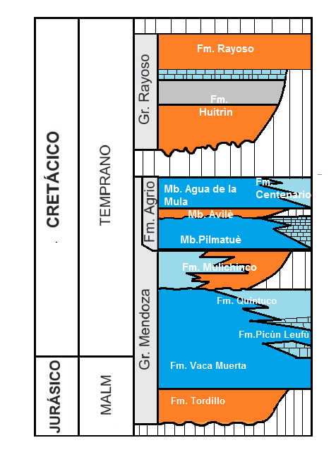 Esquema estratigráfico del Jurásico tardío y Cretácico temprano de la Cuenca Neuquina, que incluye a la Formación Agrio. Modificado de Spalletti et al 2011